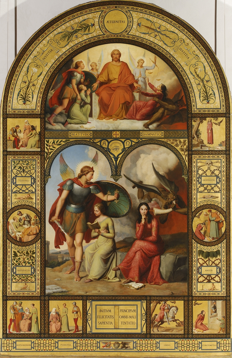 Tableau